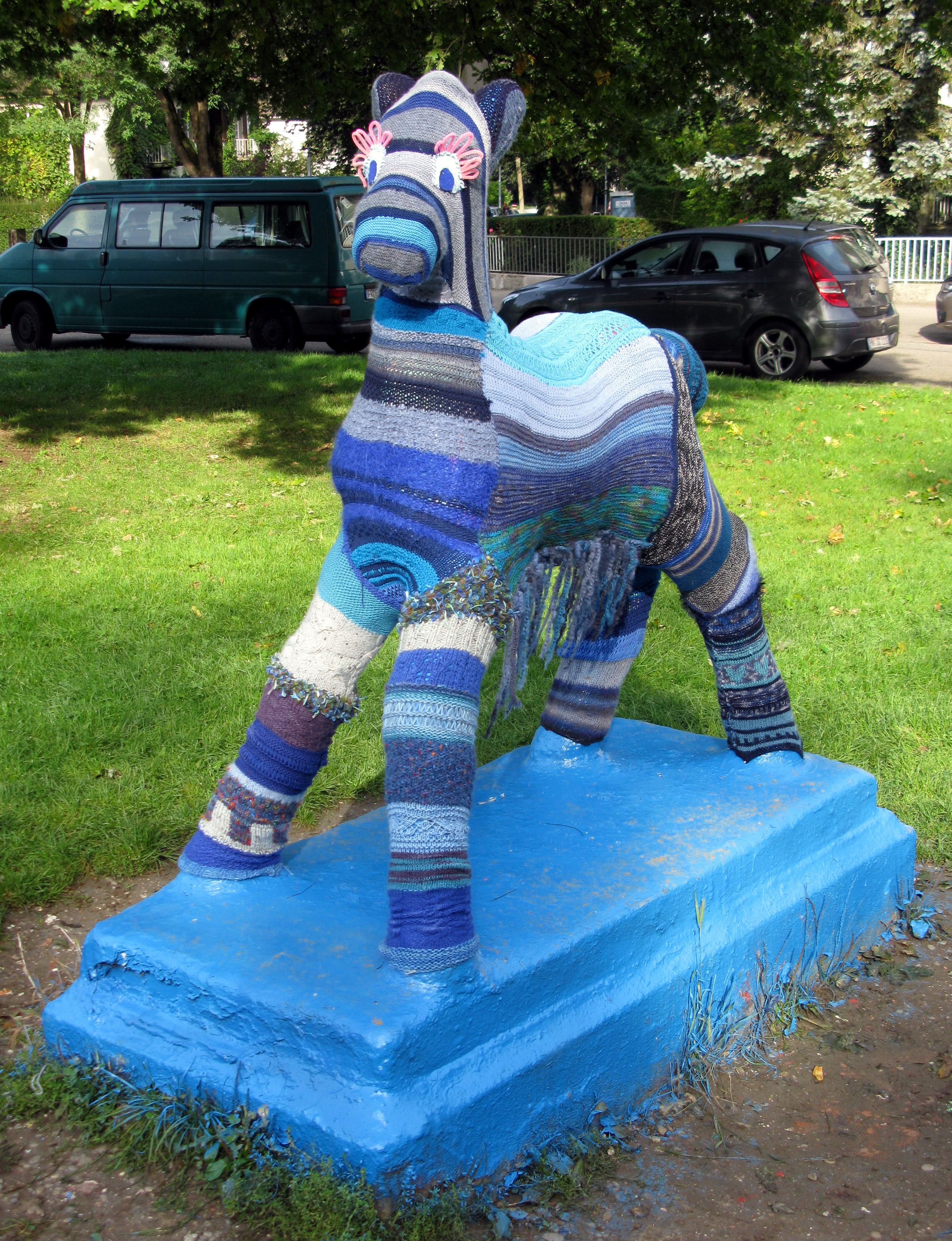 Holbeinpferd als "Wollbeinpferd"